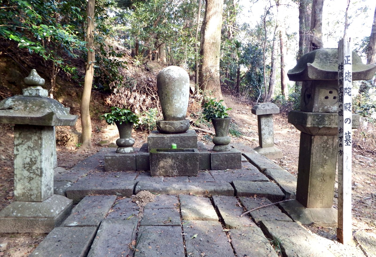 丈六寺の正徳院の墓